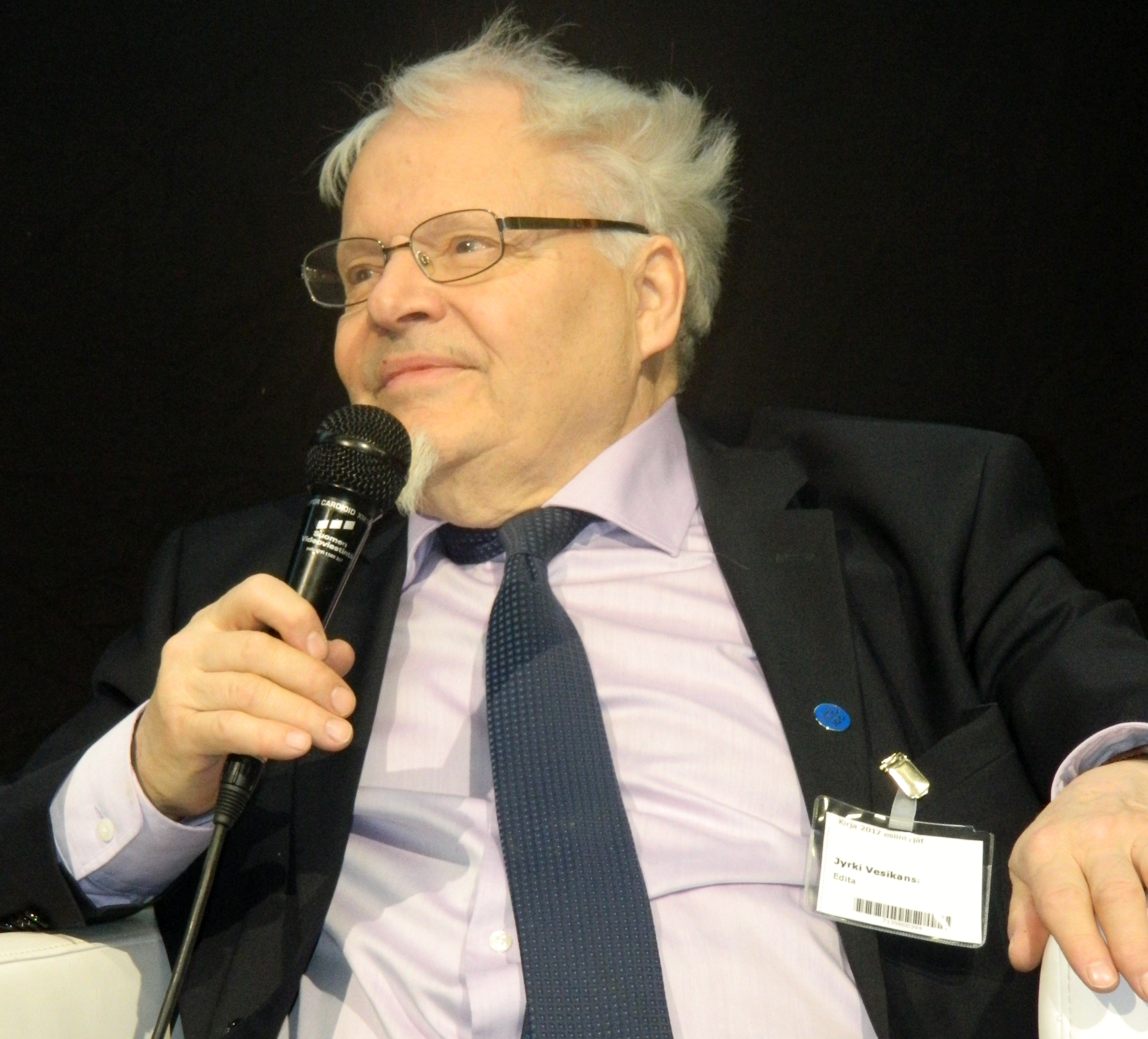 Jyrki Vesikansa Helsingin kirjamessuilla 2017